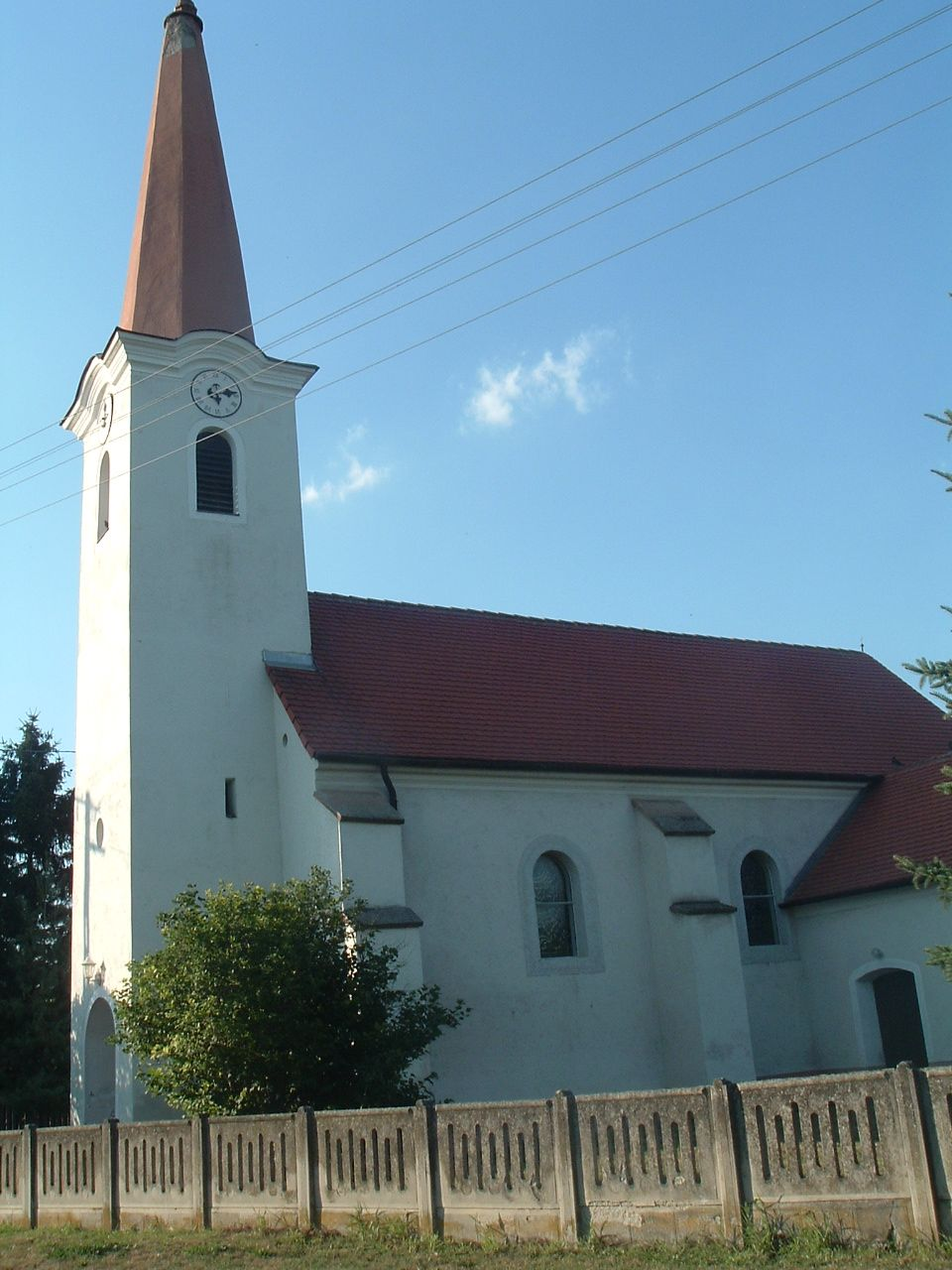 Roman Catholic Church in Sajtoskál. Szent Péter és Pál római katolikus templom